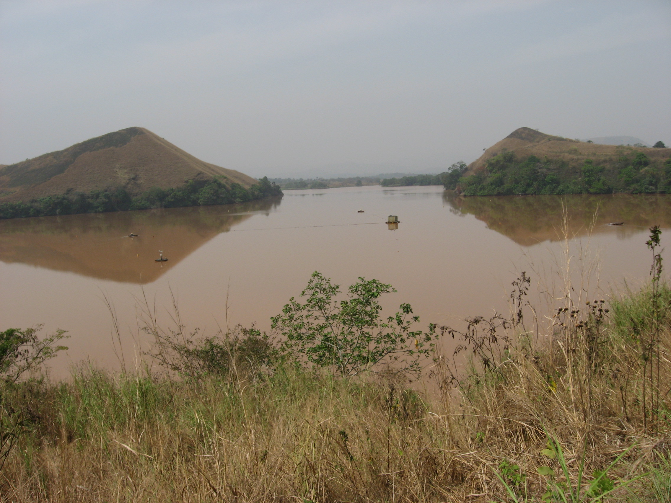 Lac Monoun situé à Nkouoptamo dans la région de l'Ouest. Conte tenu des risques, l'accès est limité.